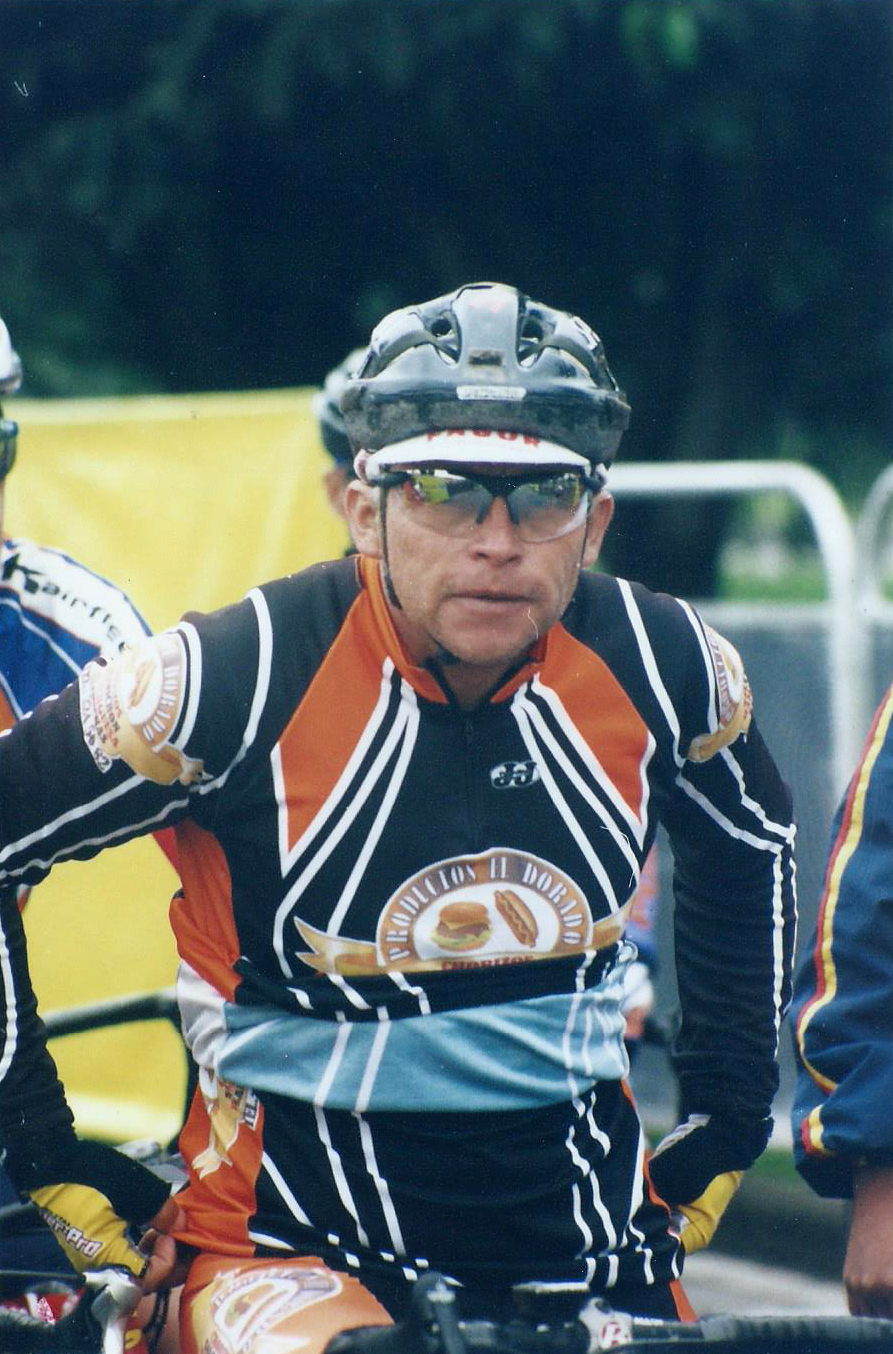 Argemiro "El Polaco" Bohorquez,Vuelta Colombia Senior Master, (2007).